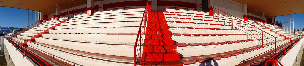 Gradins du stade de rugby de Lannemezan (Hautes-Pyrénées, France)